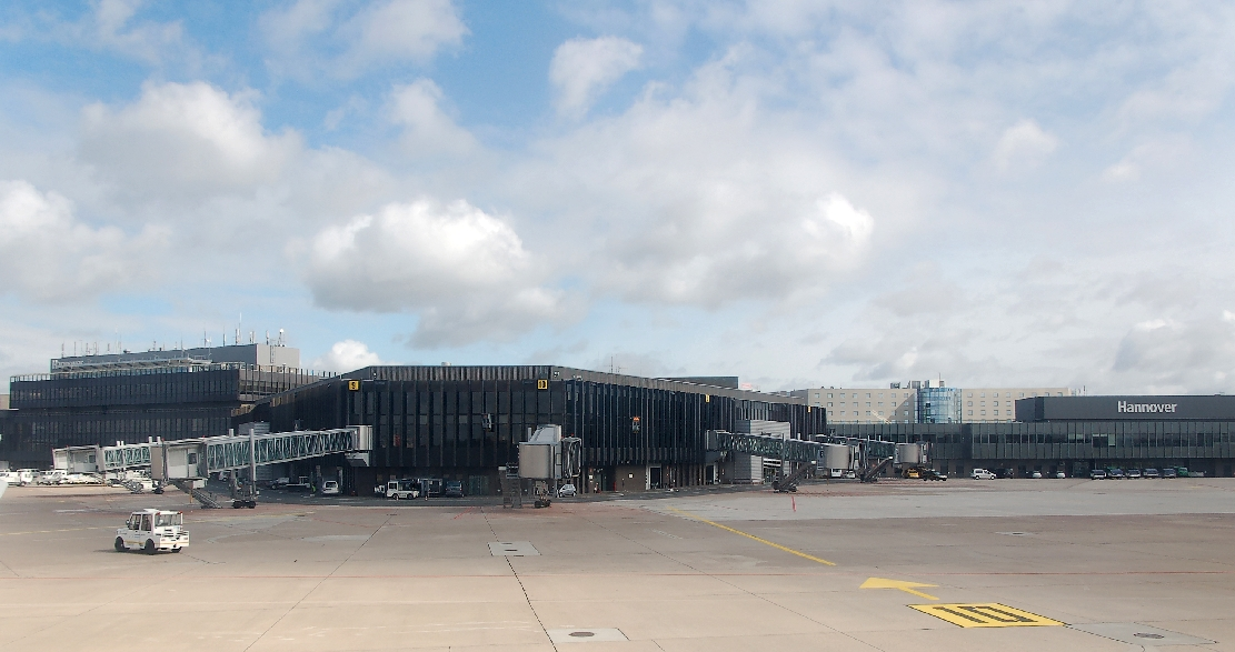 Hannover, Flughafen und Abflugsgebiet)